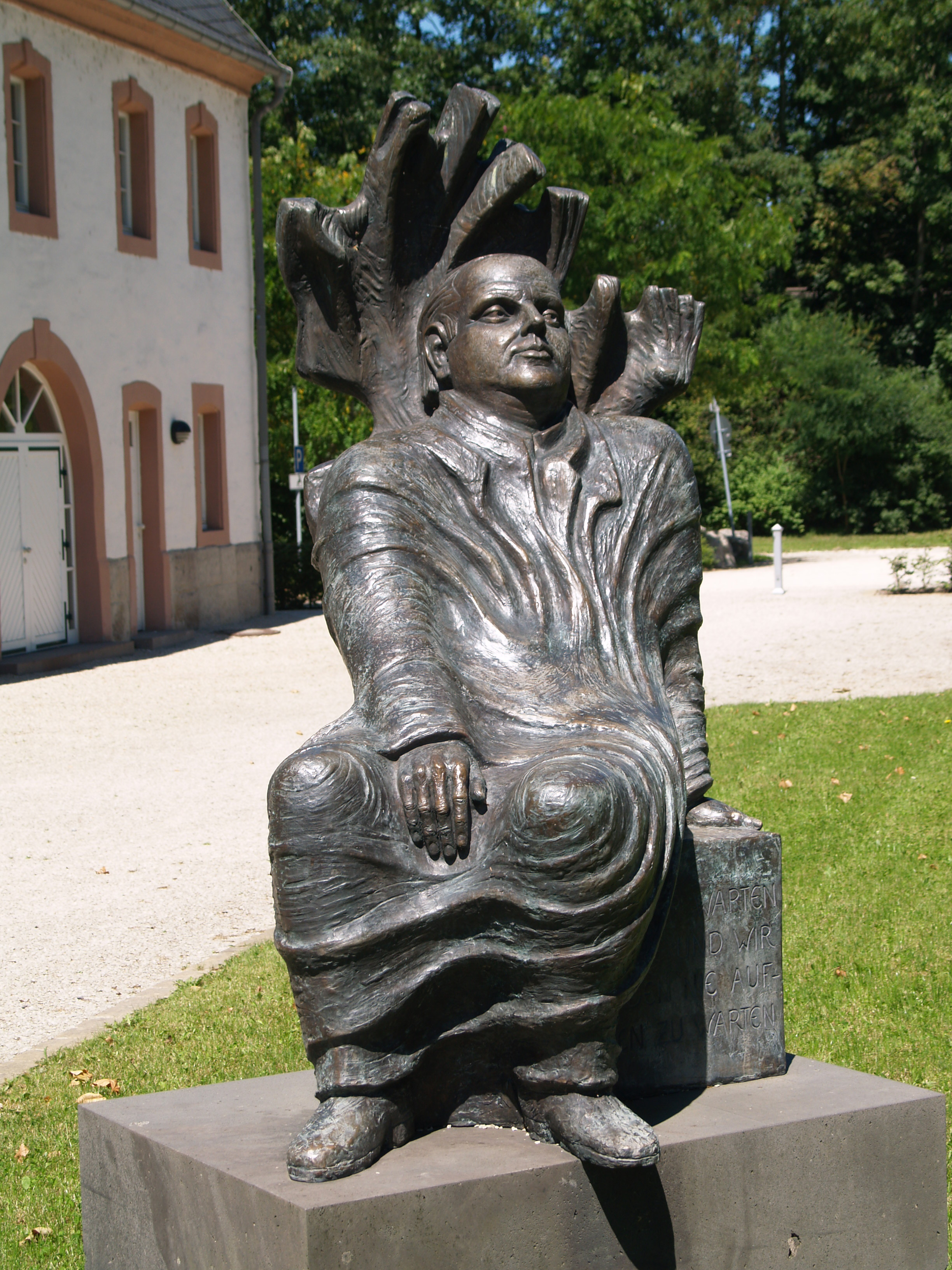 Johannes Kirschweng (Bronze-Skulptur gestaltet von Lothar Meßner, Wadgassen)